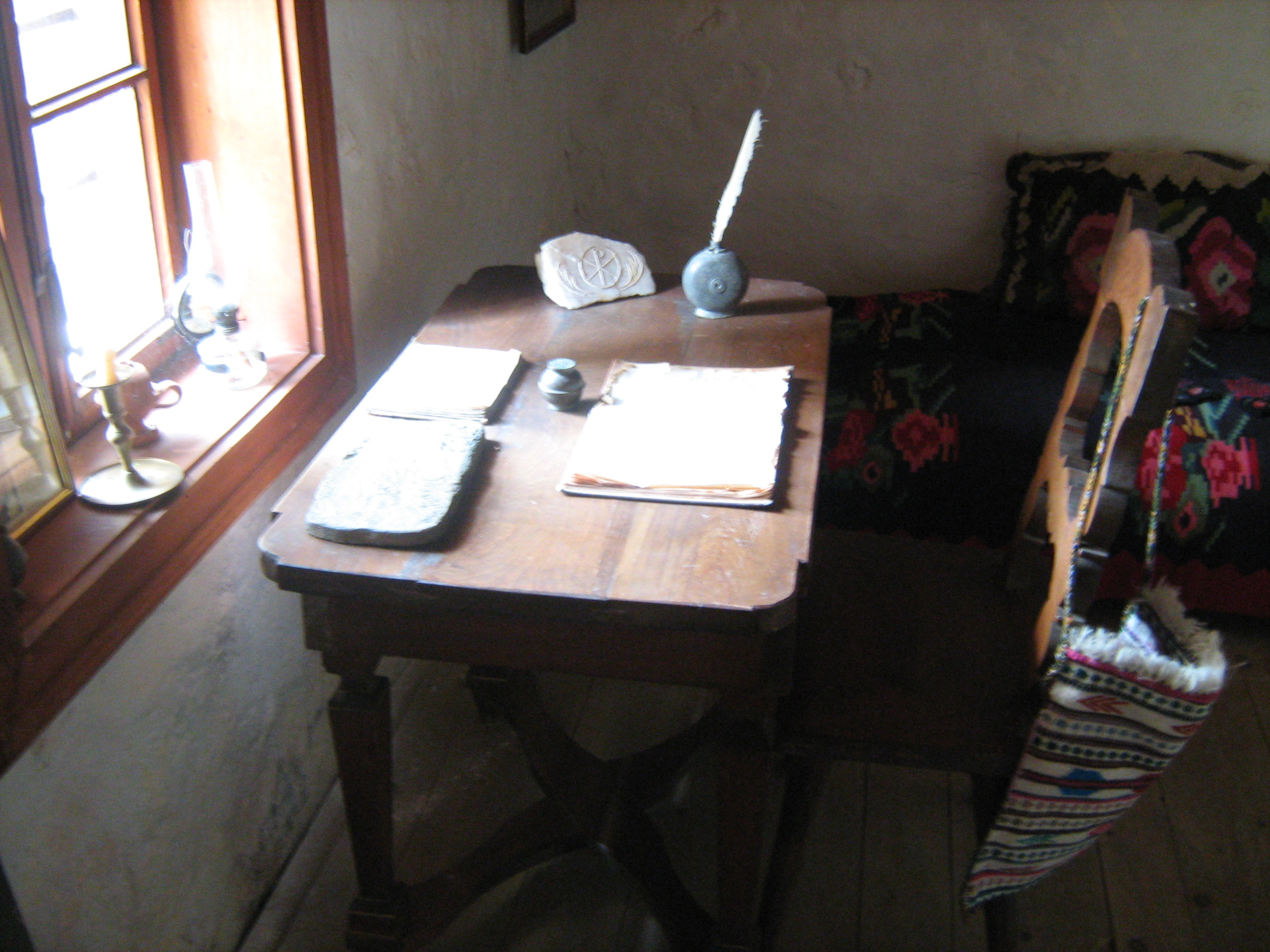 музеј Вуковог школовања